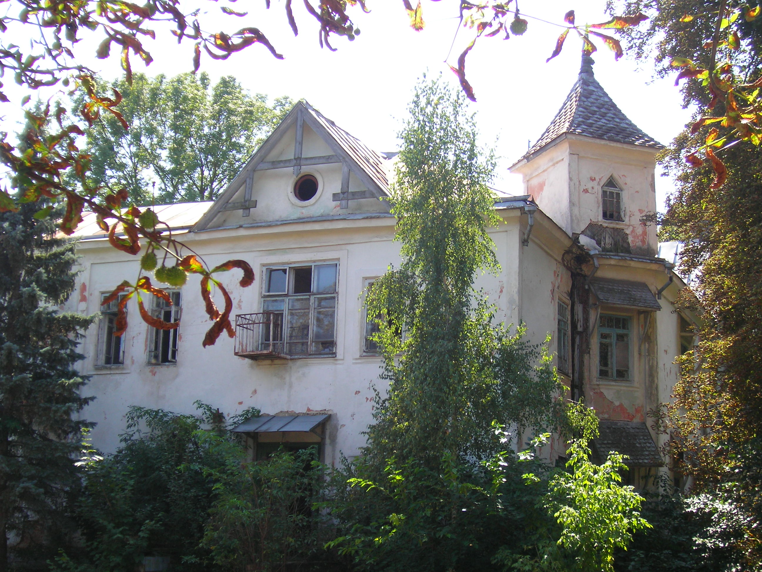 Садиба фон Мекк. Копилів